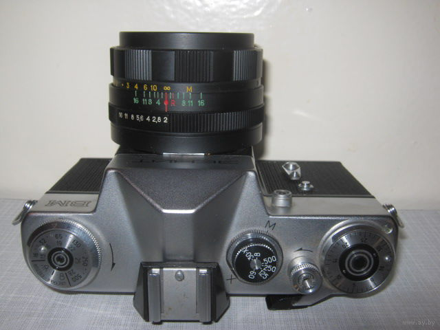 Зенит ВМ. Взято с ay.by